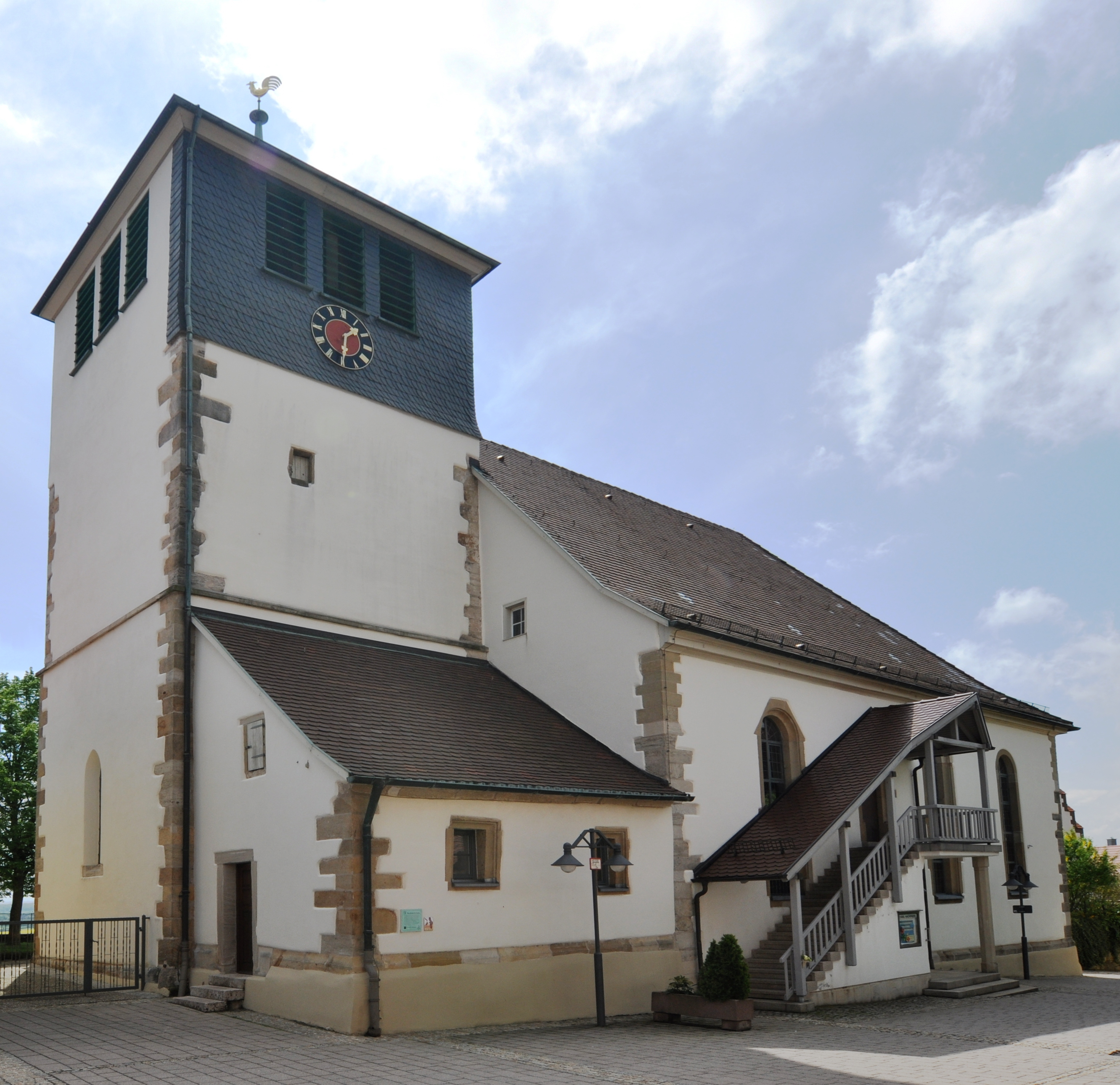 Hohenhaslach, Pfarrkirche St. Georg Sachsenheim-Hohenhaslach, protestant parish church of St. George